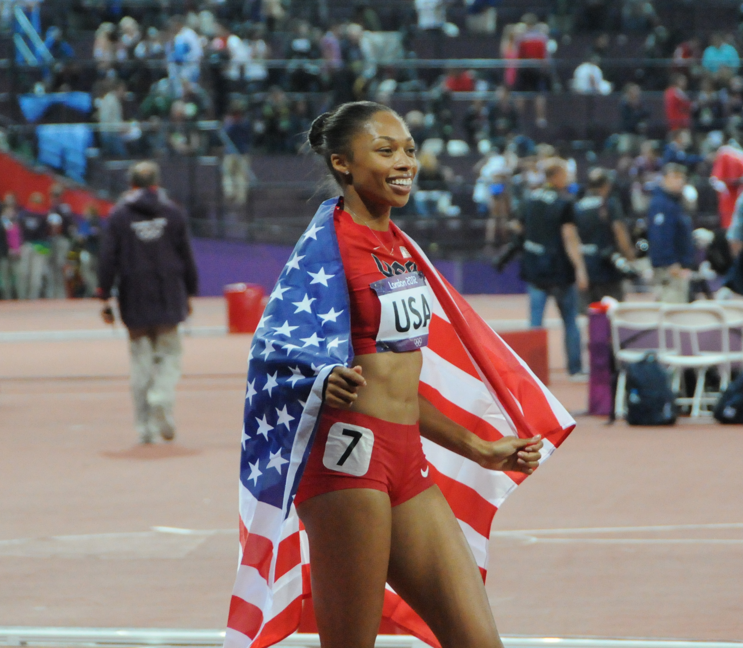 Equipe américaine du 4x400 à Londres, 2012. On voit ici Allyson Felix